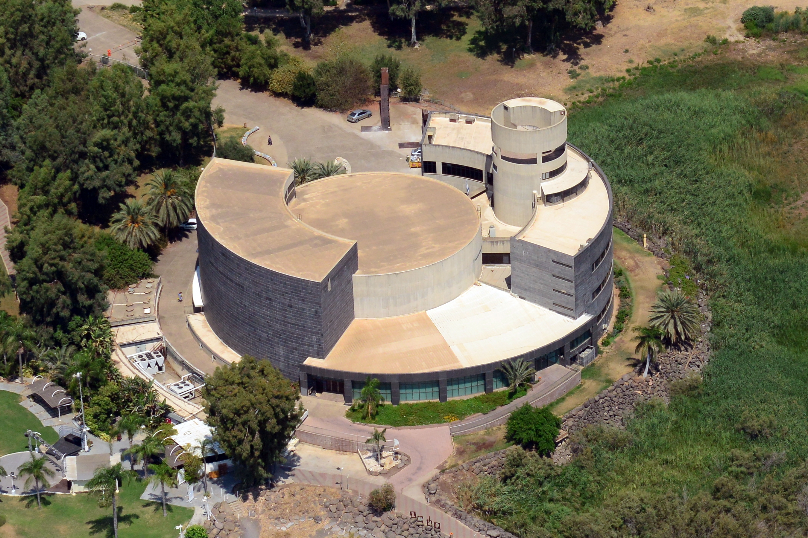 בית יגאל אלון או מוזיאון אדם בגליל הוא מוזיאון השוכן בקיבוץ גינוסר לחוף הכנרת. המוזיאון קרוי על שמו של יגאל אלון שהיה חבר הקיבוץ ונקבר בו, ומשמש מרכז חינוכי לתולדות הגליל.